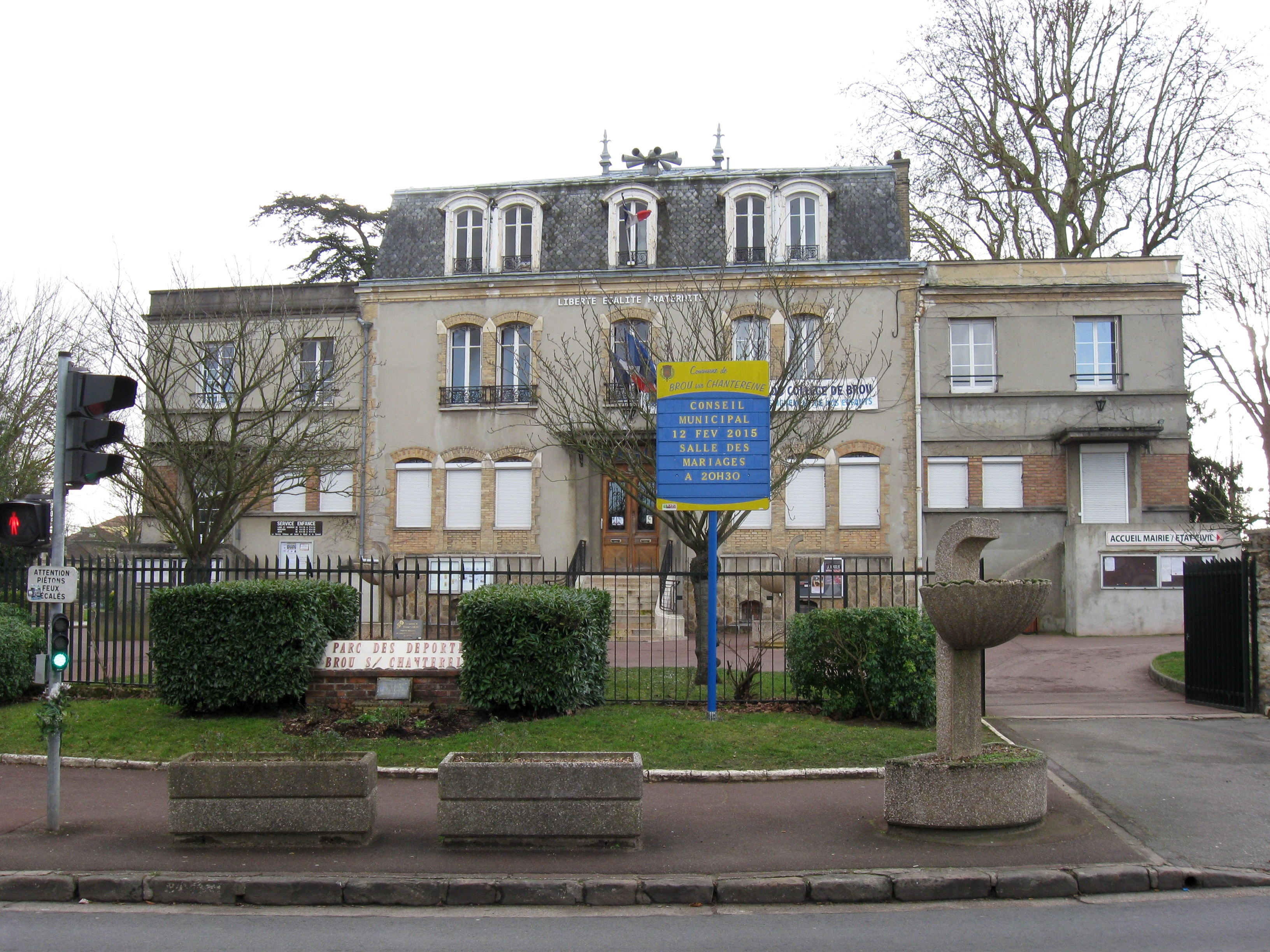 Mairie de Brou-sur-Chantereine. (Seine-et-Marne, région Île-de-France).